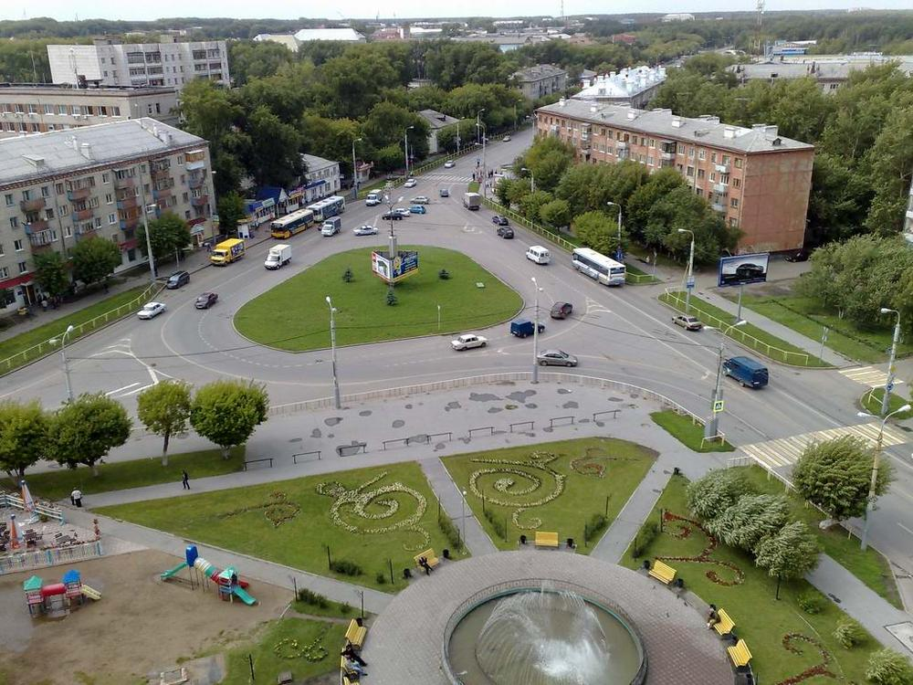 Кольцо на перекрёстке улиц Ямская, Таврическая и Белинского (район Дома Обороны) в Тюмени. Аллея молодожёнов.